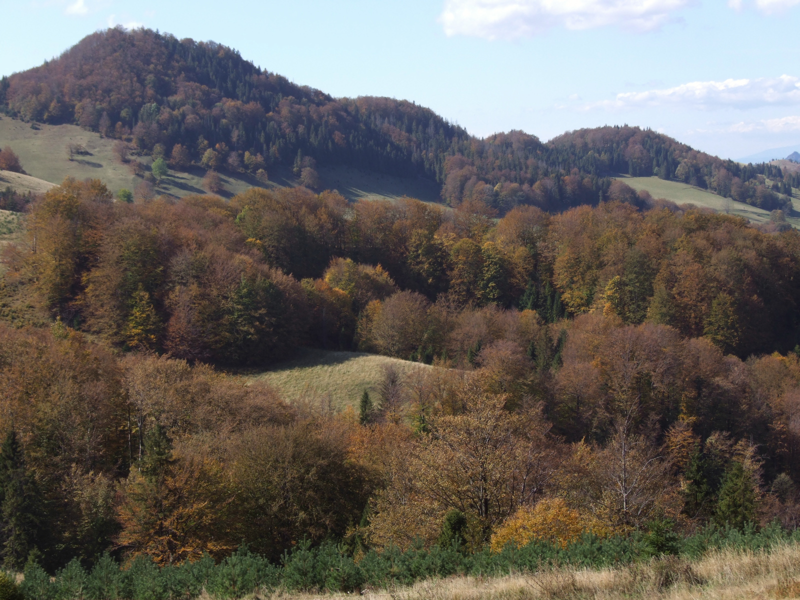 Wysoka, Borsuczyny, Durbaszka (Małe Pieniny)